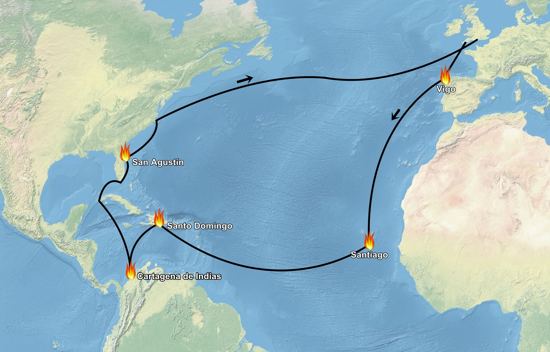 Ruta de la Expedición en la que participó Francis Drake, que partió de Plymouth en 1585 y regresó a Portsmouth en 1586. Los datos de la ruta están sacados, además de las crónicas históricas, de el mapa realizado por Baptista Boazio. El mapa sobre el que se han colocado las indicaciones es obra de Ktrinko, y se encuentra con el nombre de Eckert4.jpg. Las llamas representan combates o saqueos y son un icono disponible en Commons, obra de PioMEN DE PL y disponible en con el nombre de FireIcon.svg.